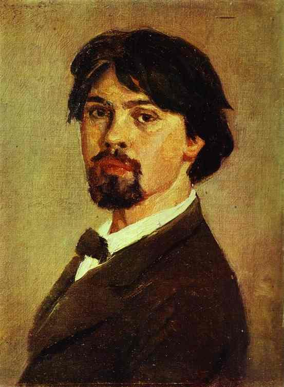 Портрет Сурикова Василия Ивановича, Автопортрет 1879.